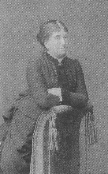 Беларуская (тарашкевіца): Алена (Гелена) Ельская, жонка Аляксандра Ельскага